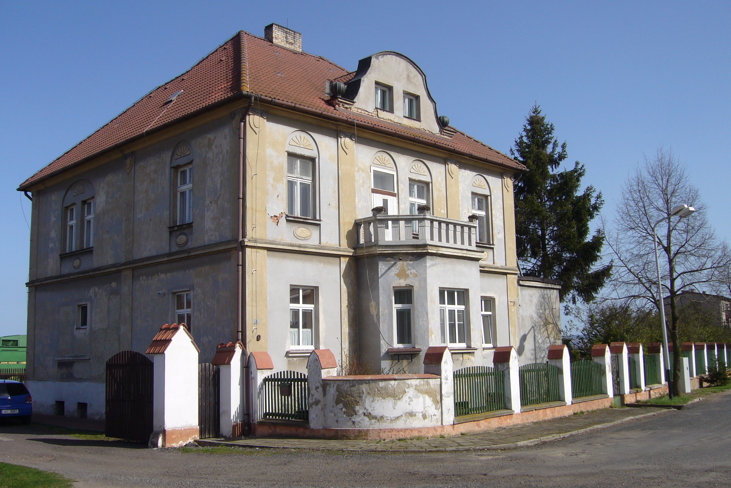 Záhoří - dům čp. 9